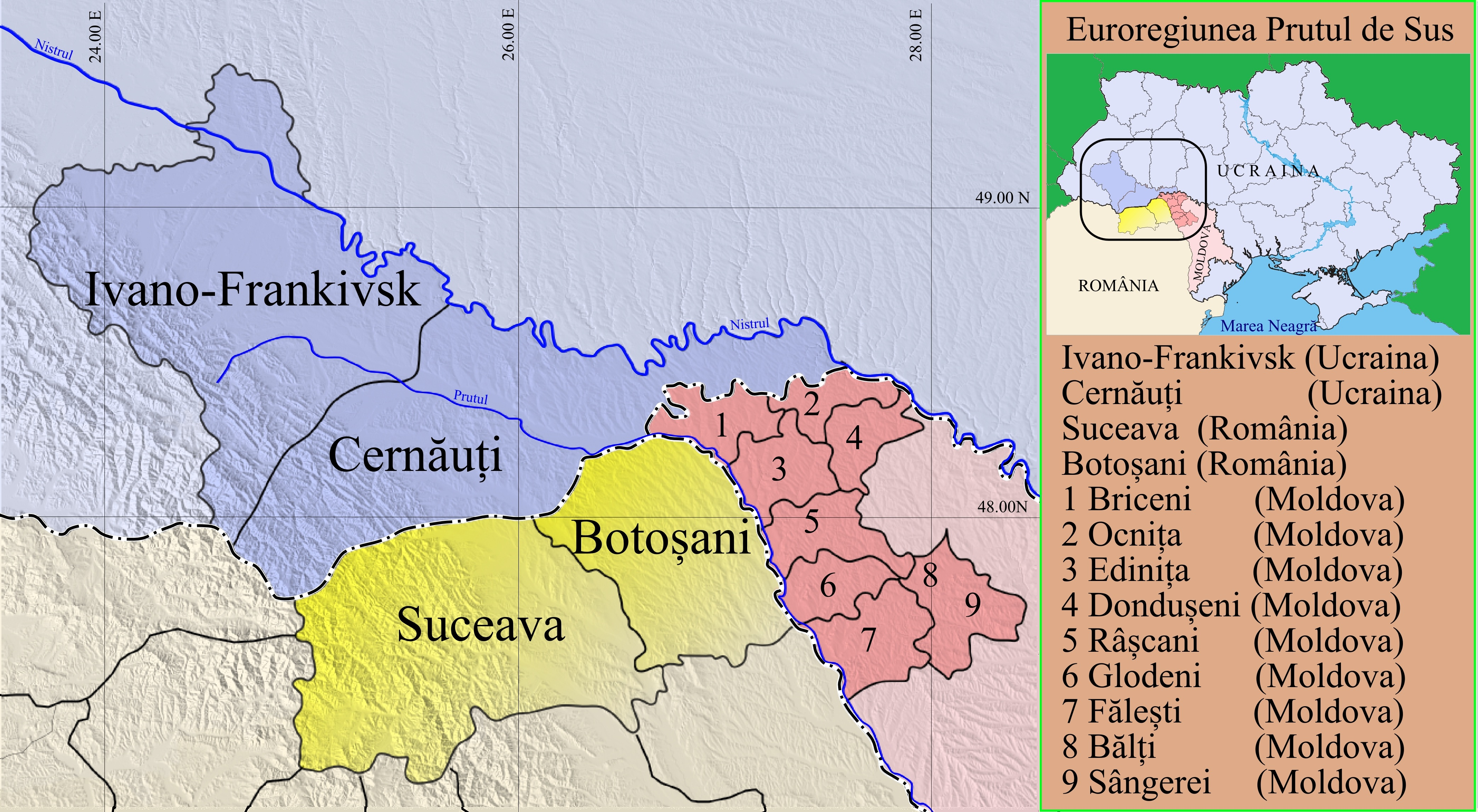 Euroregiunea Prutul de Sus. Harta activa(fara legenda) este calibrata GPS pe urmatoarele coordonata: (49.65N, 47.05N), (23.5E, 28.5E)